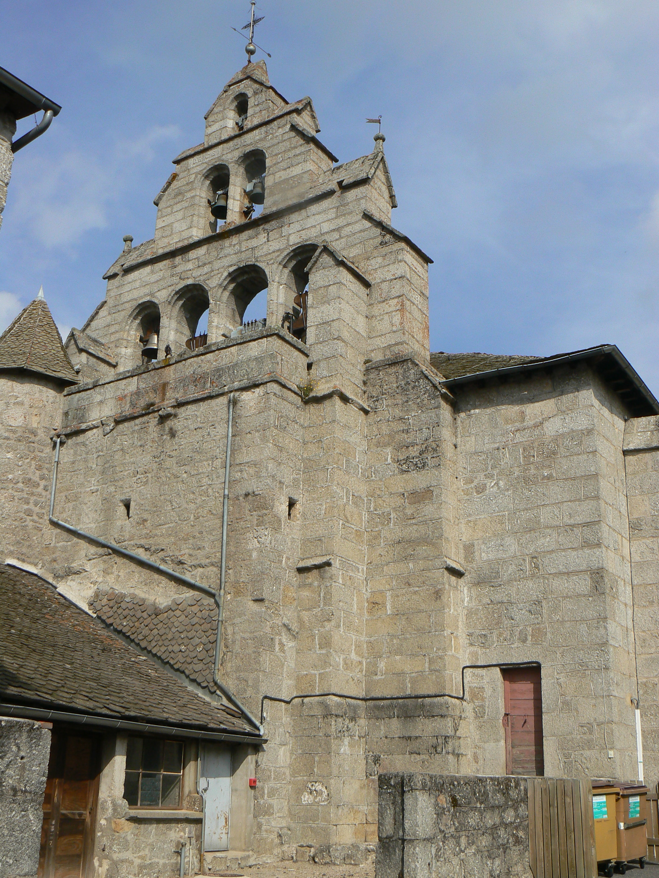 Clocher de l'église de Rieutort-de-Randon en Lozère (France)